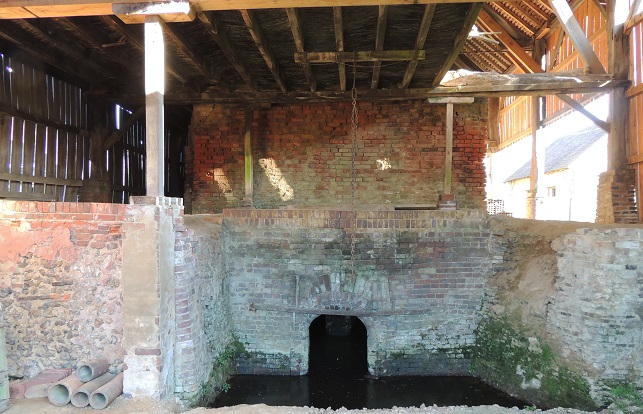 Tuilerie des Saules , four industriel, en briques blanchies avec l'eau pour le refroidissement au pied et le toit de la haute grange au dessus